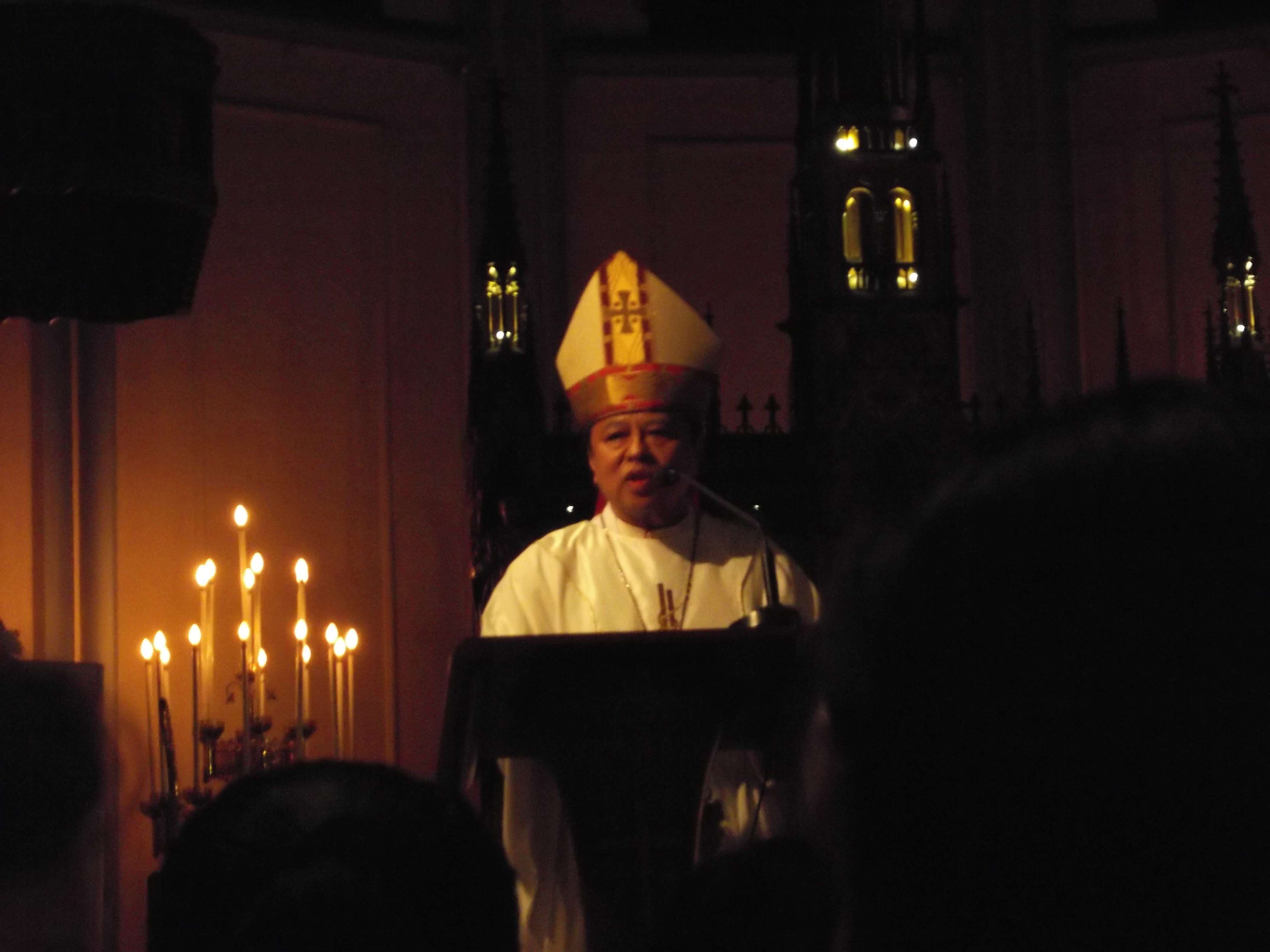 Mgr. Ignatius Suharyo, Roman Catholic Archbishop of Jakarta on the Feast of St. Albertus in Jakarta Cathedral.